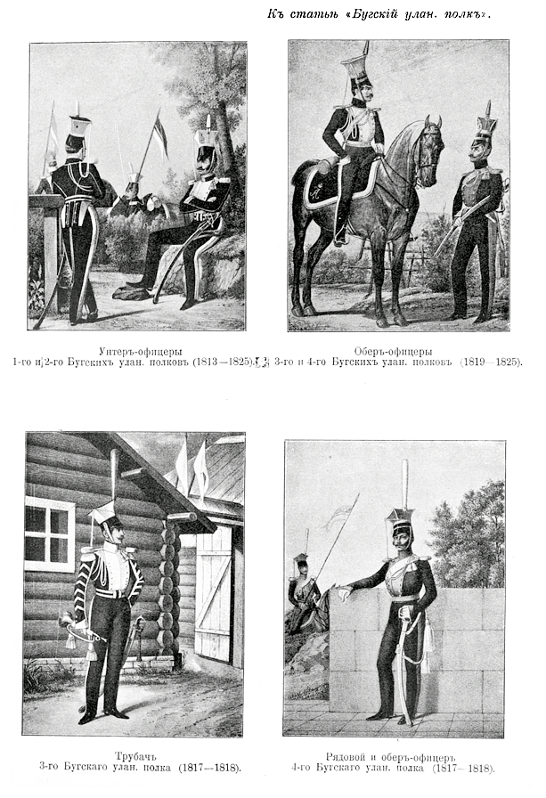 Данное изображение было использовано в статье «Бугский, 9-й уланский, Е. И. К. В. эрцгерцога австрийского Франца-Фердинанда, полк» опубликованной в пятом томе «Военной энциклопедии», который был издан книгоиздательским товариществом Ивана Дмитриевича Сытина в 1911 году в столице Российской империи городе Санкт-Петербурге.